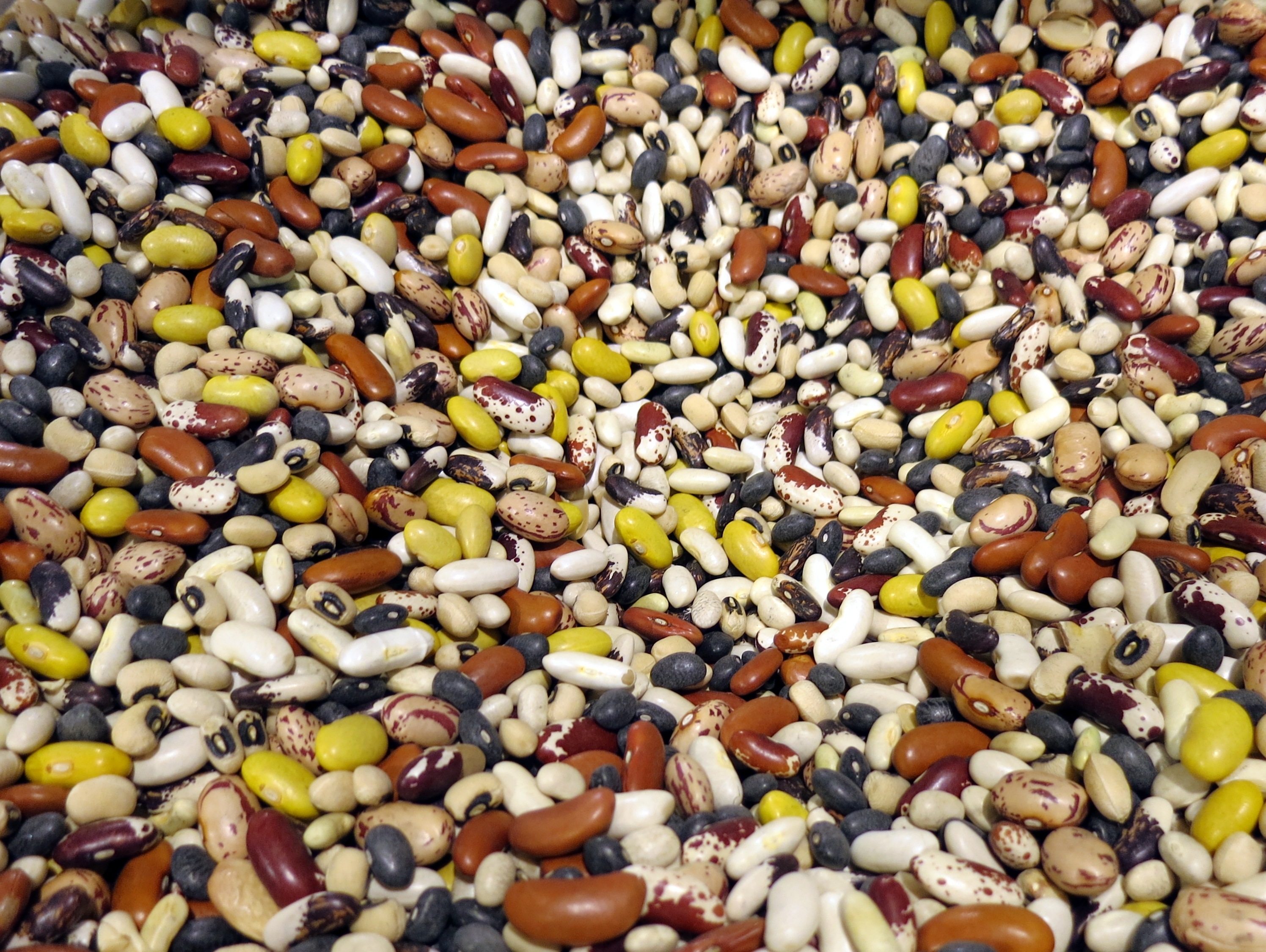 Beans for sale